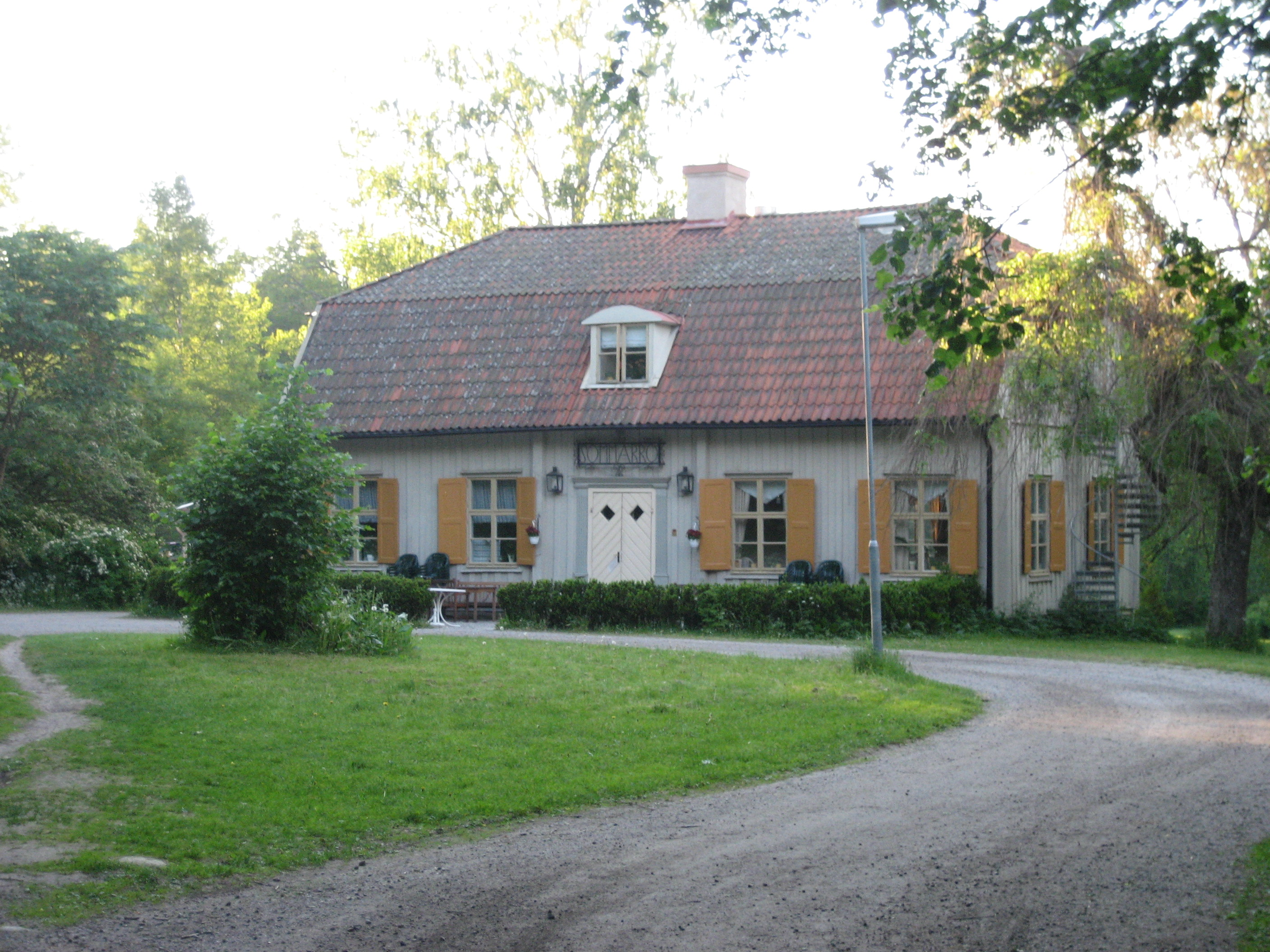 Sommarro Värdshus of Adolfsberg, Sweden